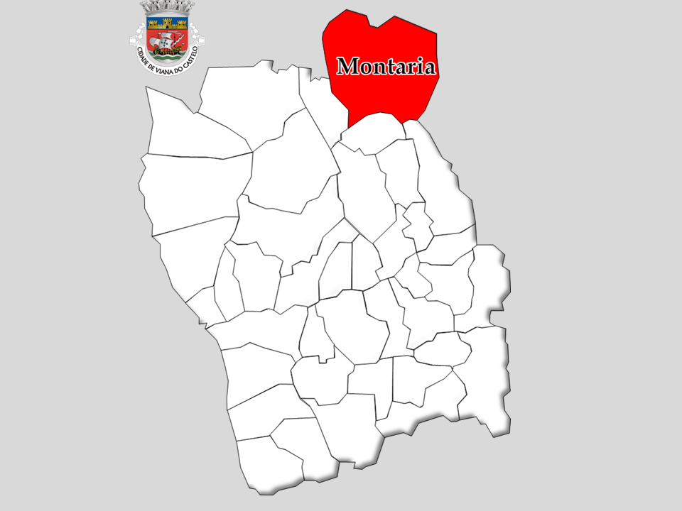 Censos 1864/2011